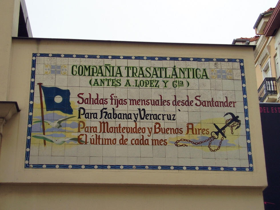 El mercado del Este es un mercado antiguo que esta en Santander (Cantabria). El mercado del este en la actualidad Actualmente está ocupado por diferentes comercios.